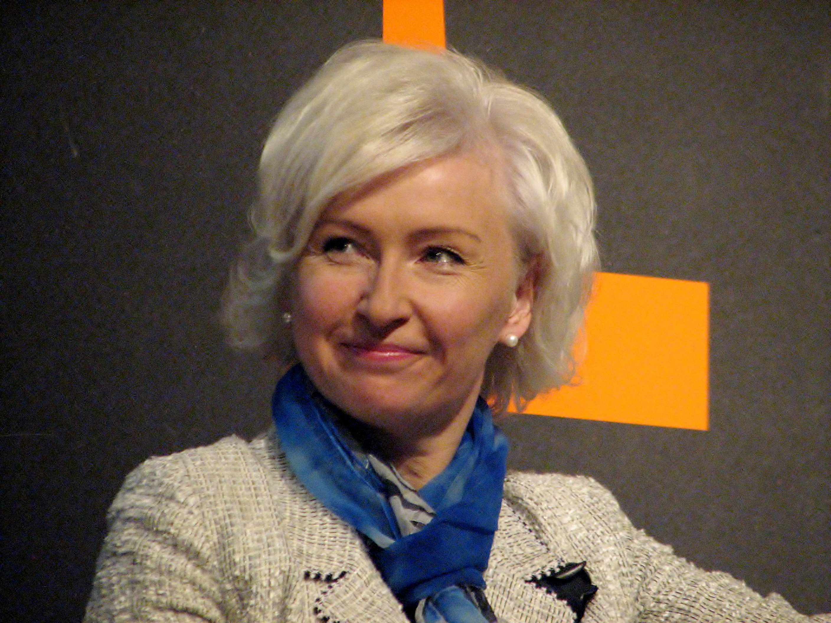 Kristiina Ojuland enda raamatu "Dekaad. Kümme aastat NATOs ja Euroopa Liidus" esitlusel Solarise keskuse Apollos